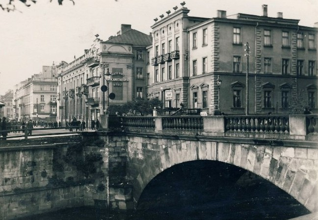 Kalisz, Poland, pałac Weigtów i most Kamienny